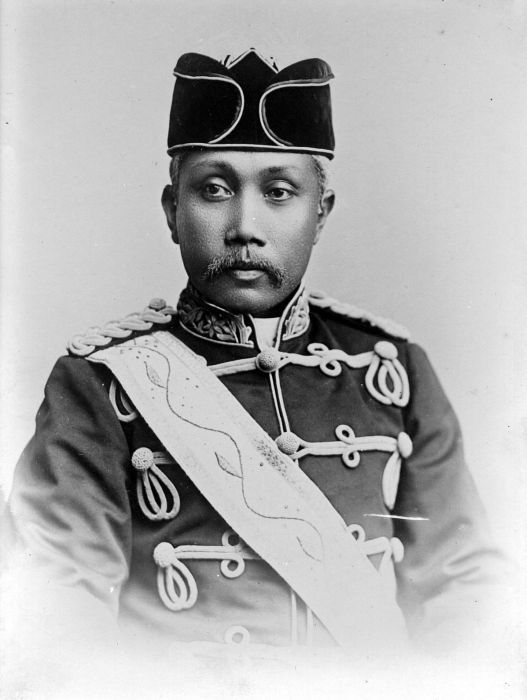 Repronegatief. Studioportret van Ma'amun Al Rashid Perkasa Alam Shah, Sultan van Deli